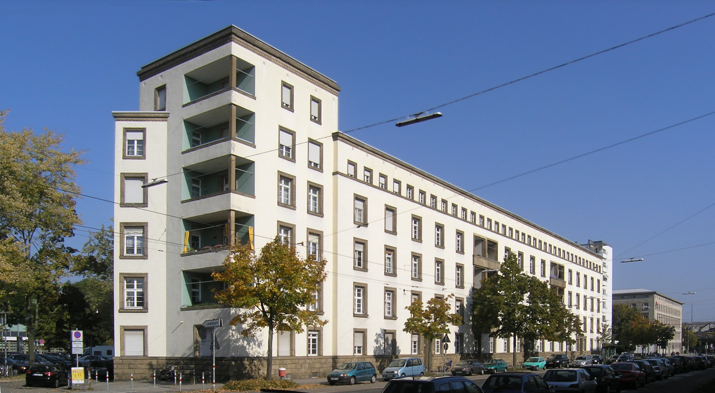 Karlsruhe, Wohnblock Hermann-Billing-Straße 2-6 (1929) und Oberpostdirektion (1938), beide von Hermann Billing.